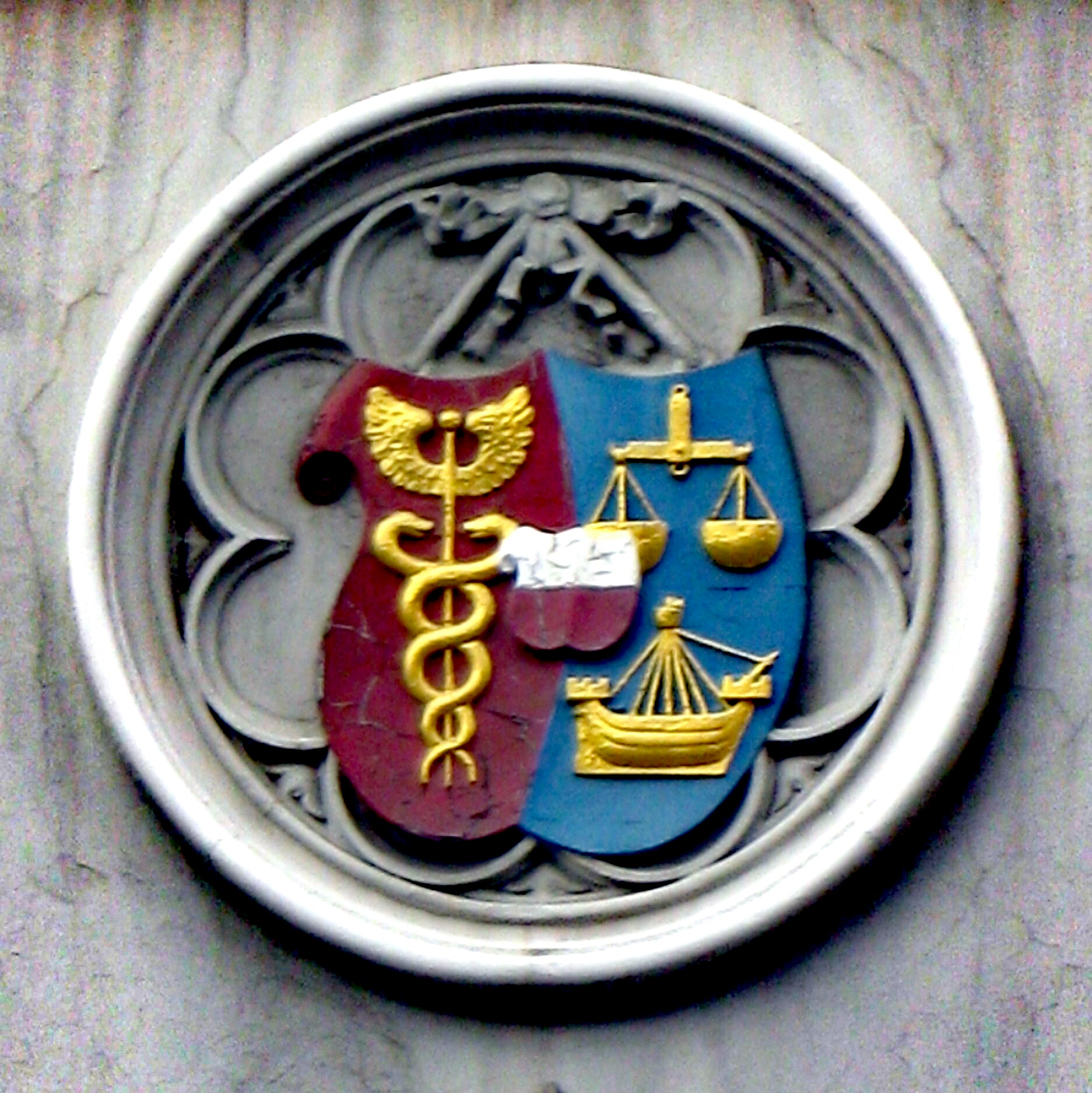 Wappen an der Fassade des Hauses der Lübecker Kaufmannschaft in der Breiten Str. 6 in Lübeck.